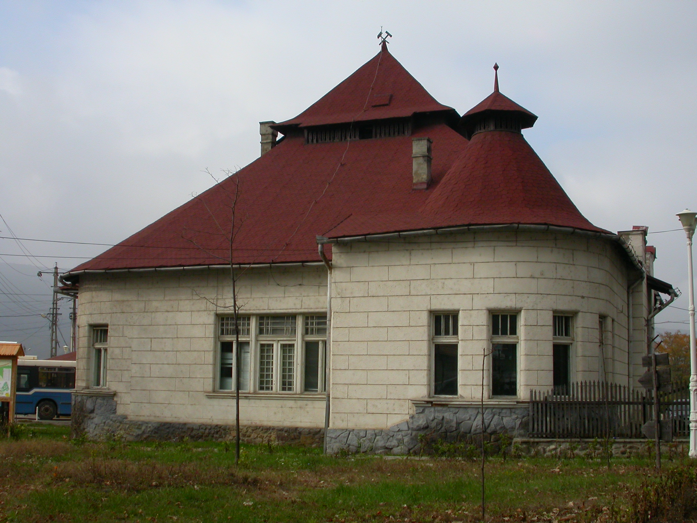 Fosta cancelarie a minei de sare, azi dispensar medical, înc. sec. XIX